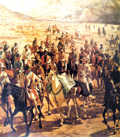 Conducción del cadáver de Juan Lavalle por la Quebrada